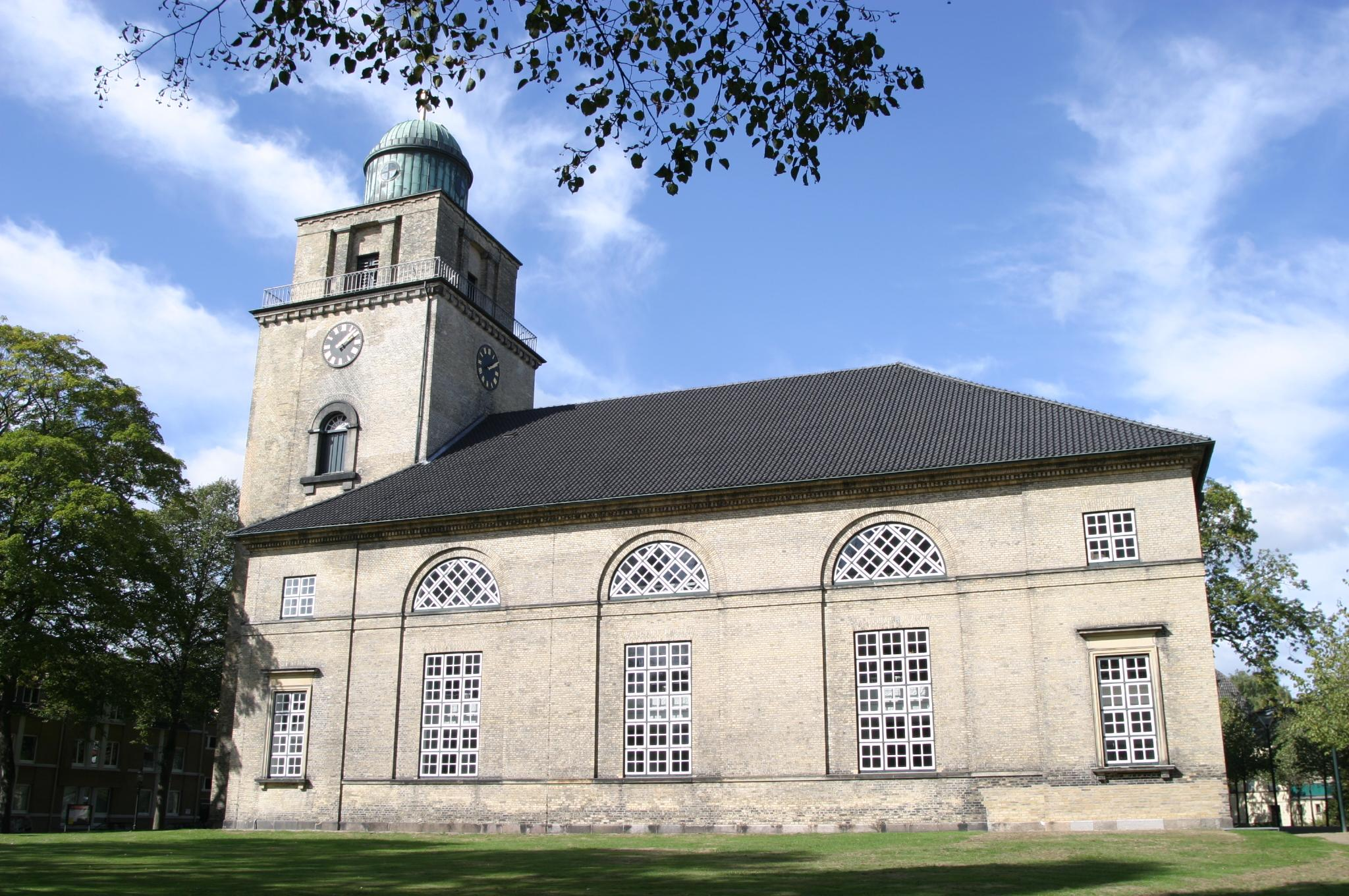 Vicelin-Kirche (Vicelin Church) Neumuenster Germany